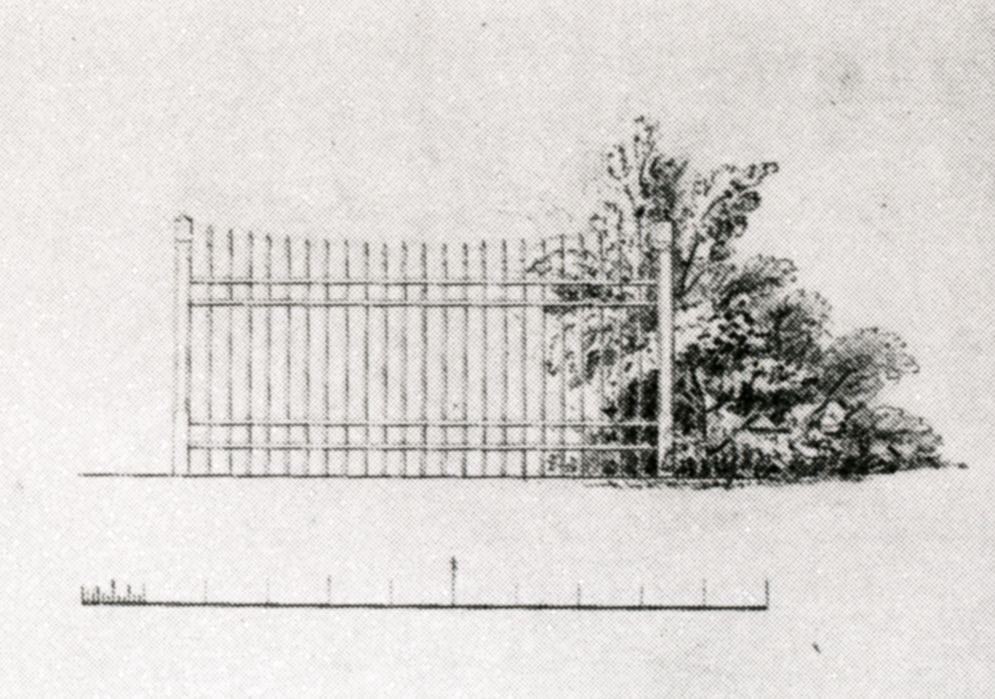 Staketenzaun am Park Klein-Glienicke